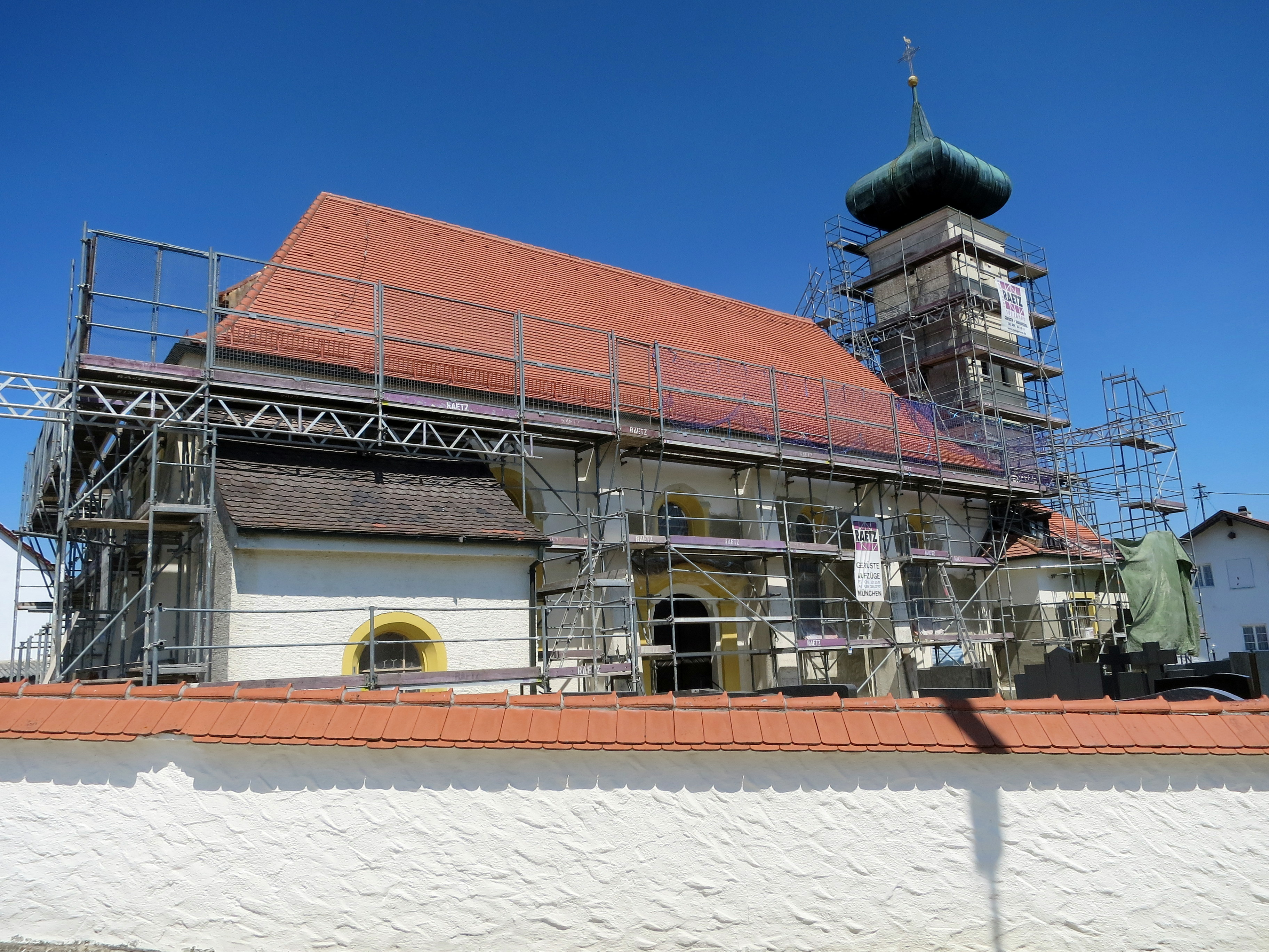 Eine alte Pfarrkirche, die nach dem Ersten Weltkrieg erweitert wurde.